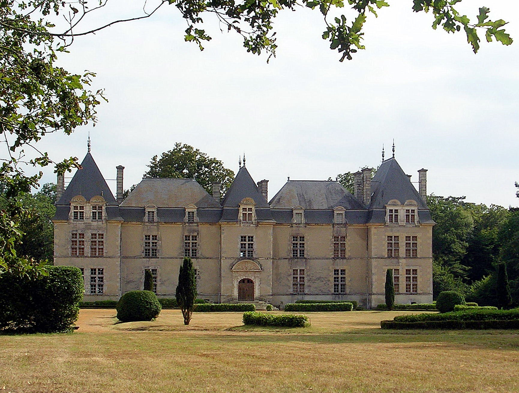 Château de Ravignan à Perquie (Landes, France)